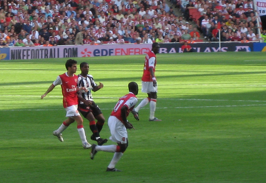 Cesc Fabregas, cropped